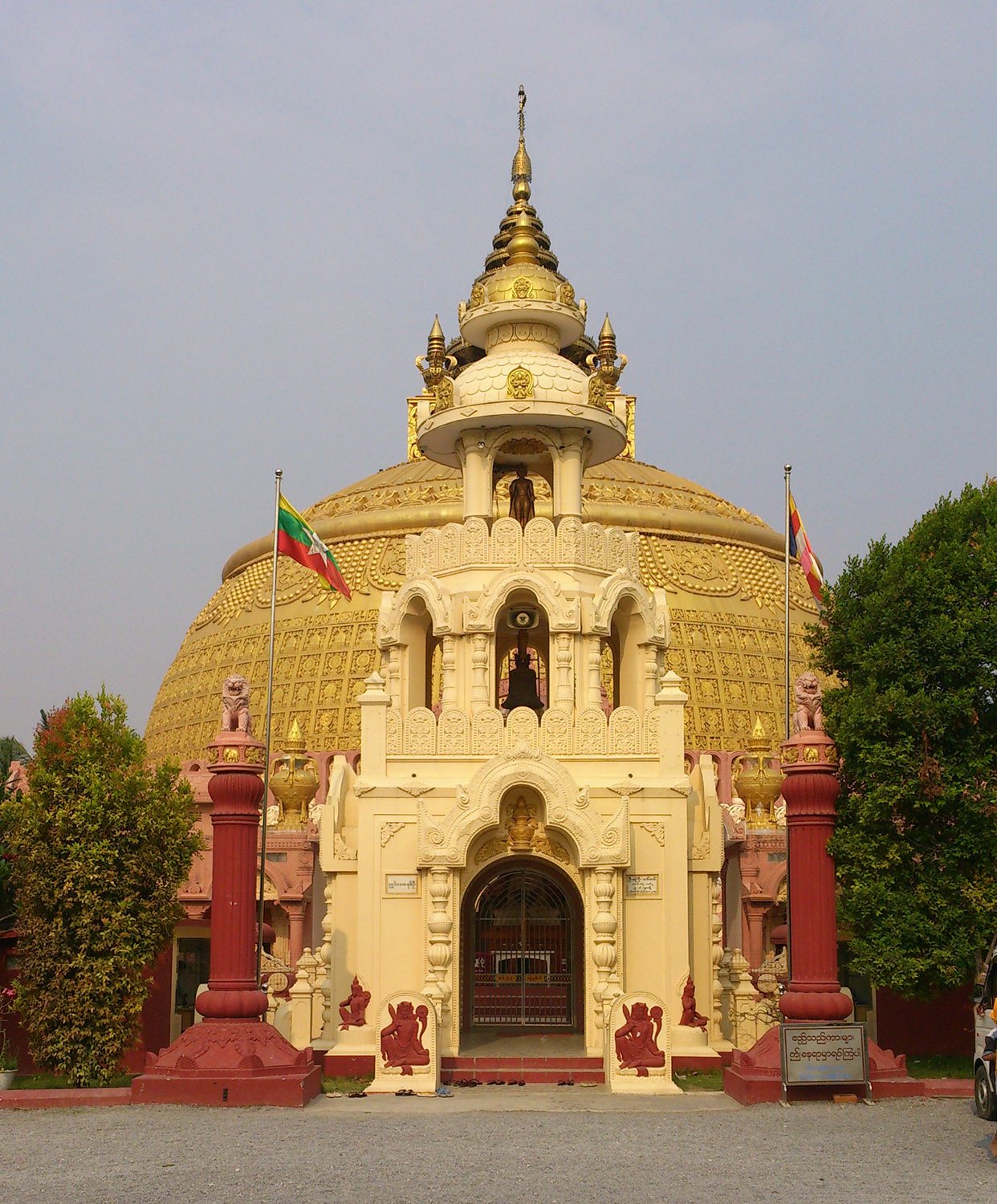 မြန်မာဘာသာ: စစ်ကိုင်း သီတဂူ ဗုဒ္ဓတက္ကသိုလ်